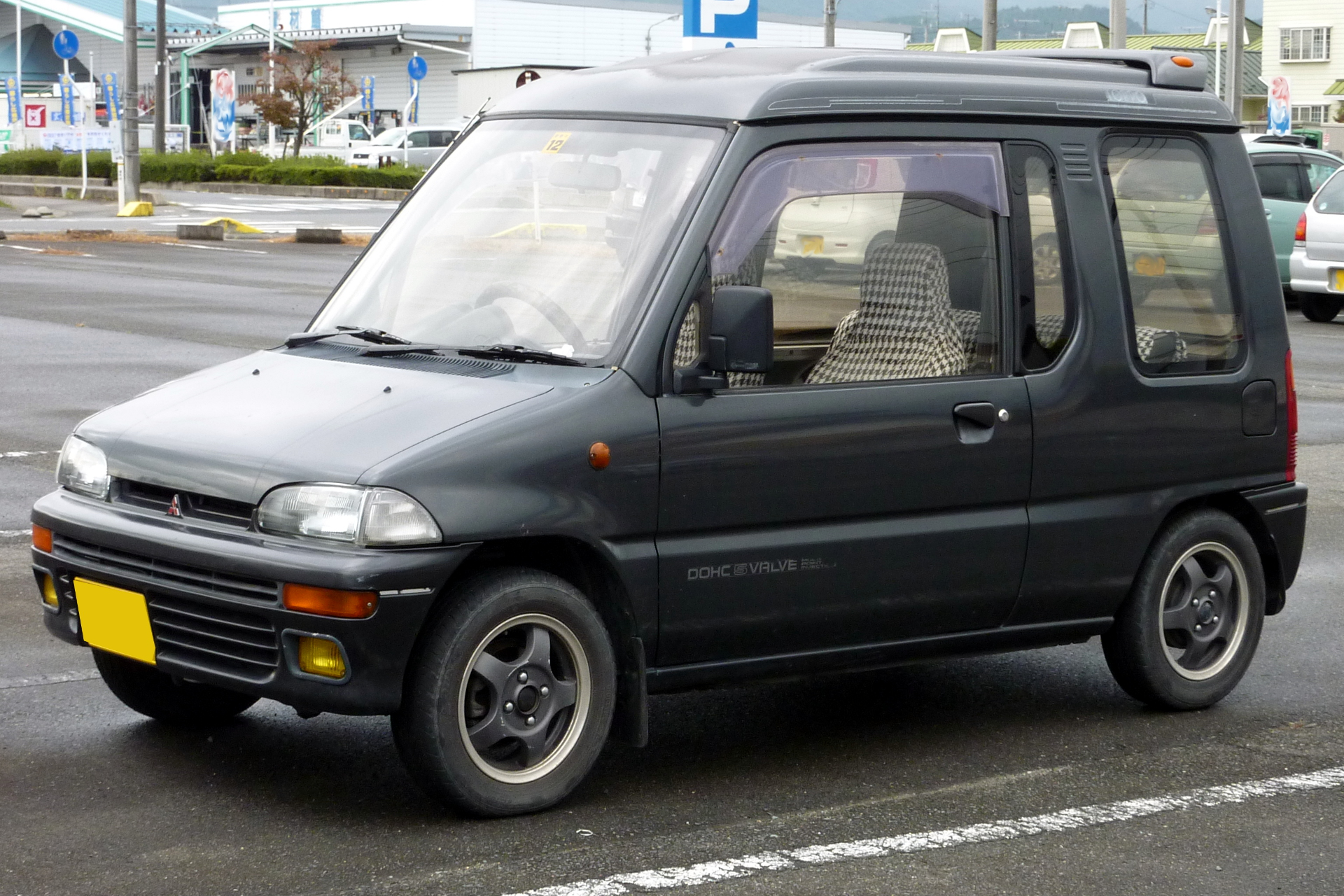 初代ミニカトッポ（後期型）